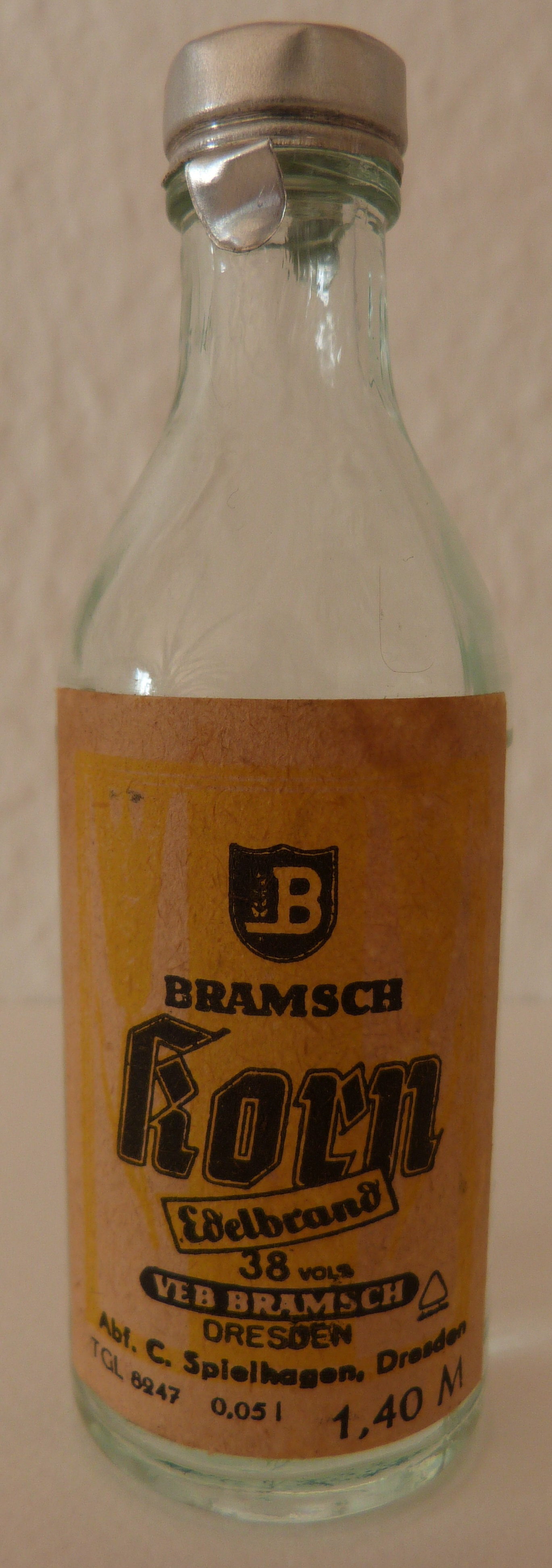 Miniaturflasche Bramsch Korn Edelbrand aus DDR-Zeiten vom VEB Bramsch Dresden, Abfüller C. Spielhagen, Dresden; Inhalt 0,05 l, Preis 1,40 M